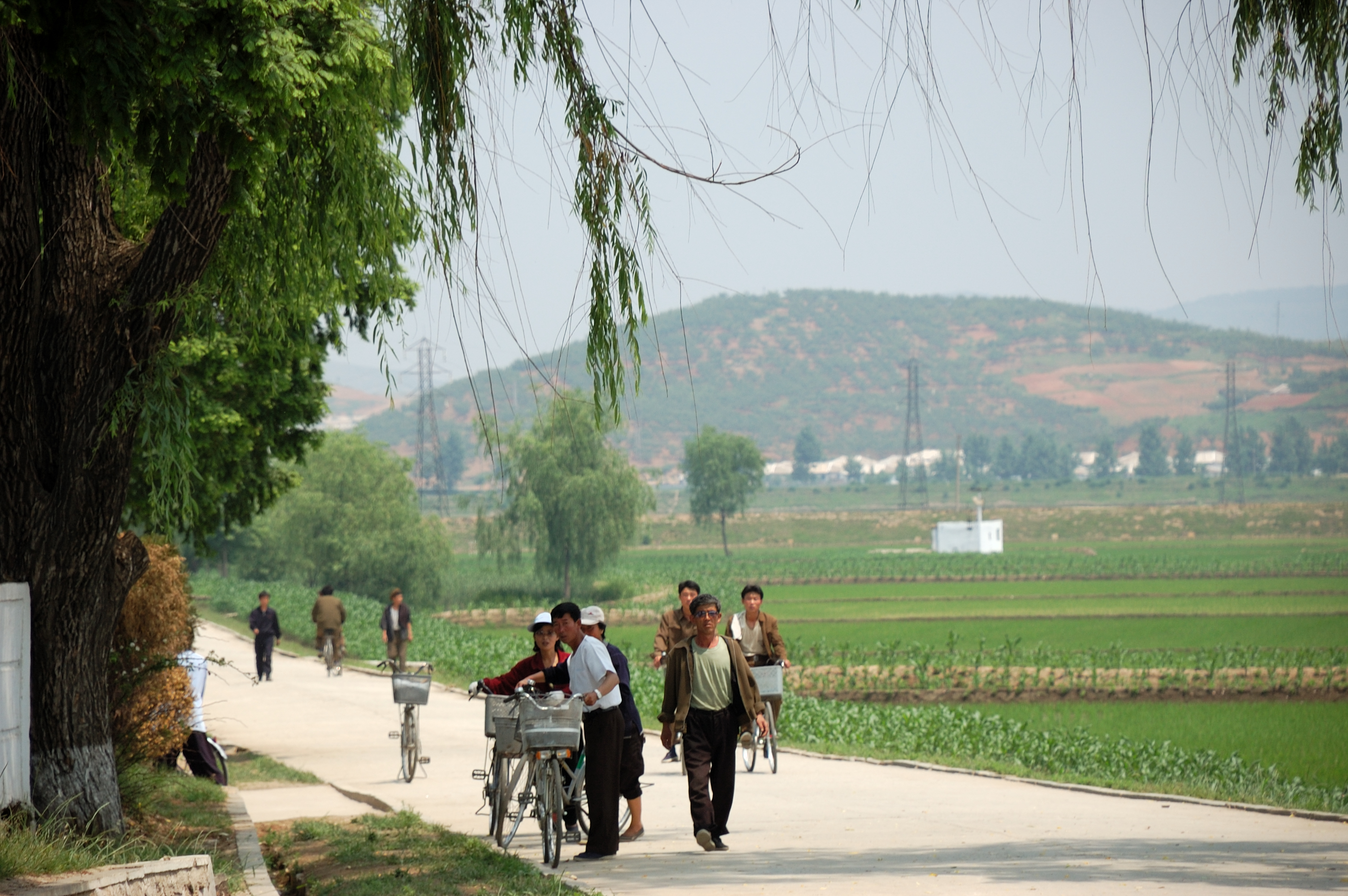 Chongsan-ri Farm, Kangso, North Korea.